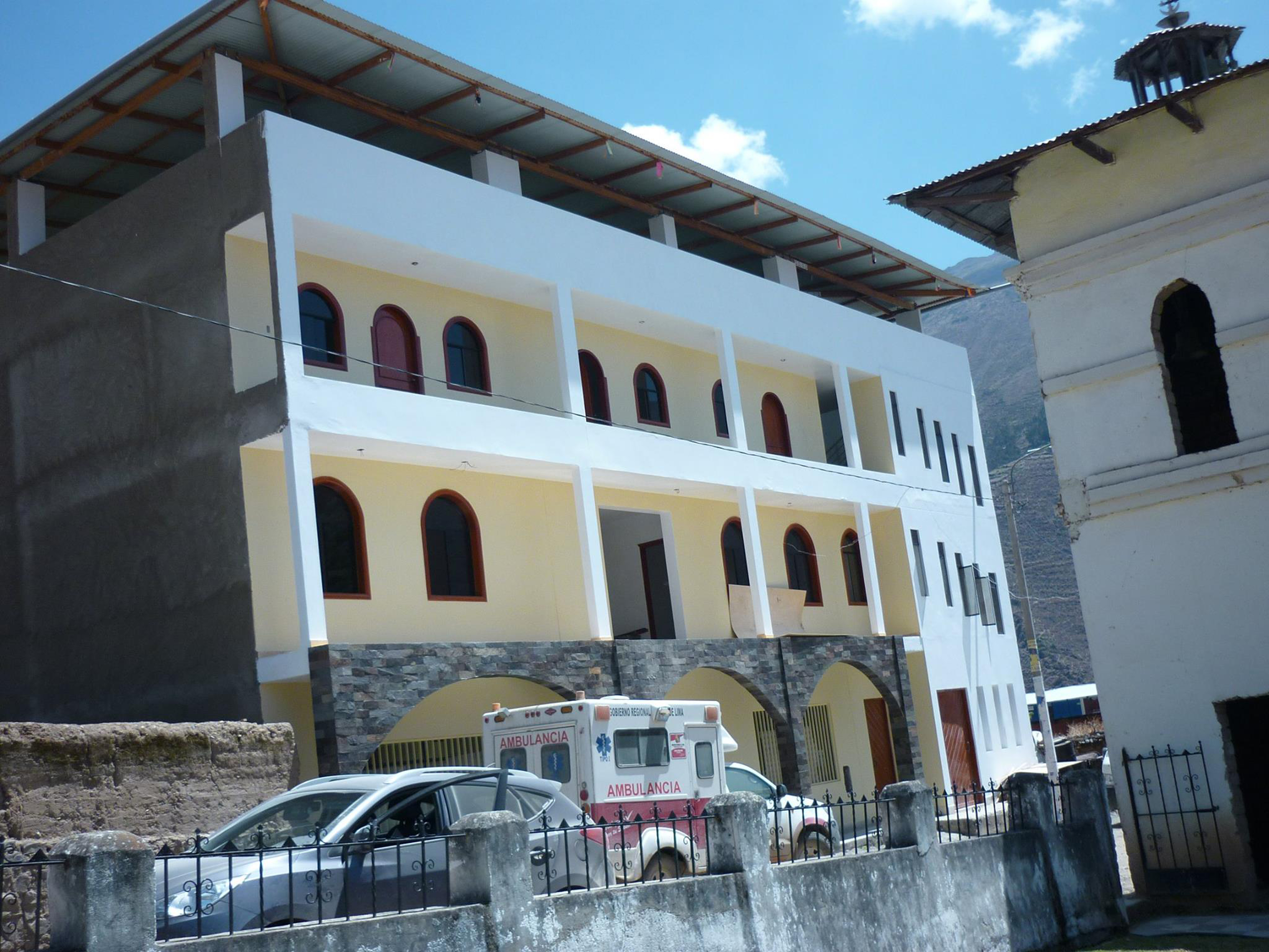 Centro Civico, Obra Ex alcalde Antolin Villanueva Solis